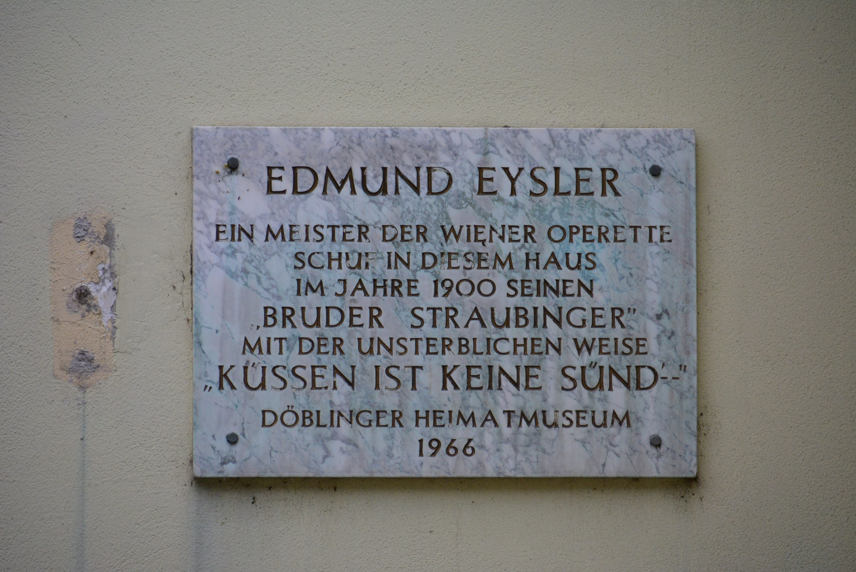 Gedenktafel für Edmund Eysler (Wien, Himmelstraße 4), Adresse ident mit Cobenzlgasse 3